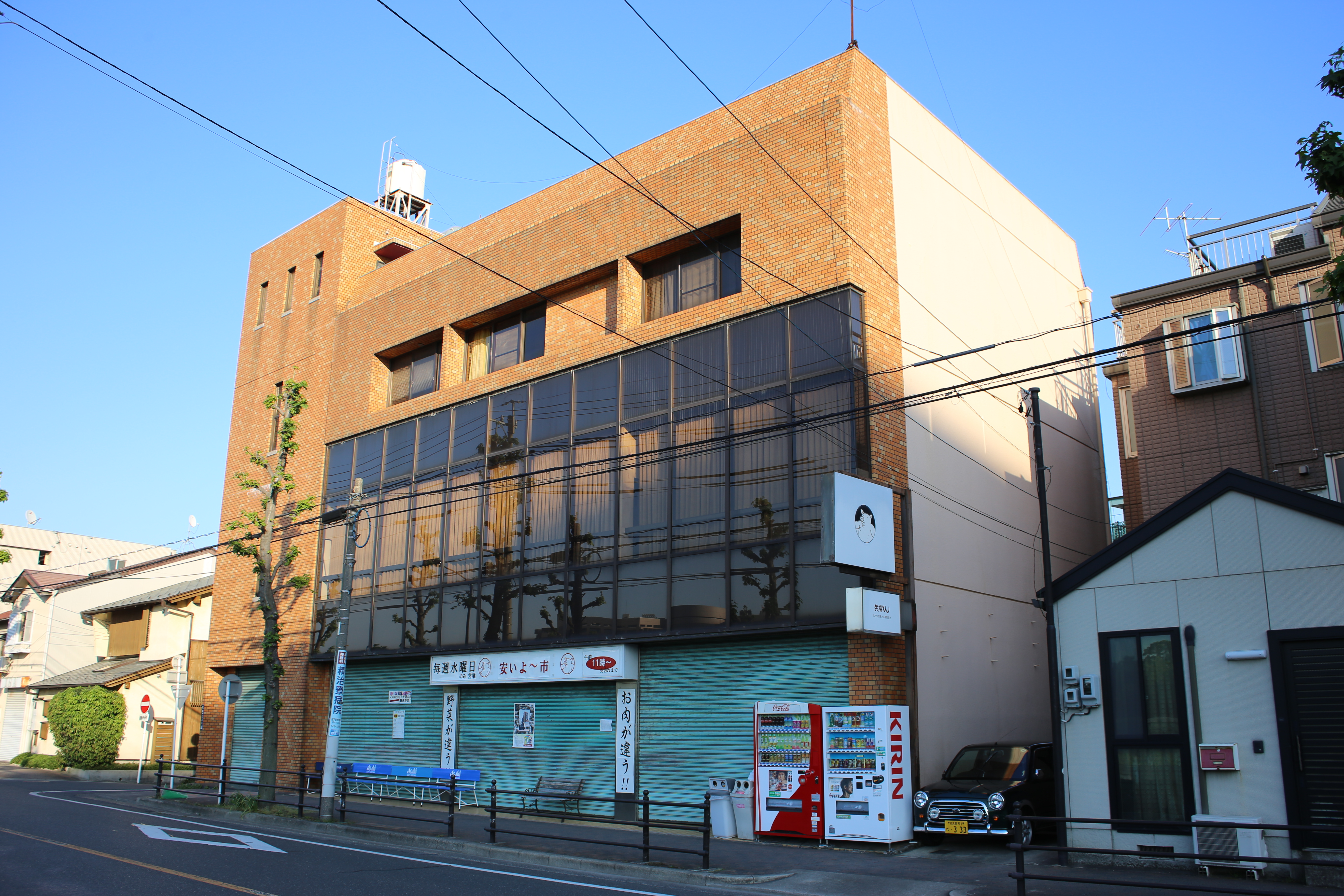 名古屋市昭和区鶴舞の矢場とん安いよ～市